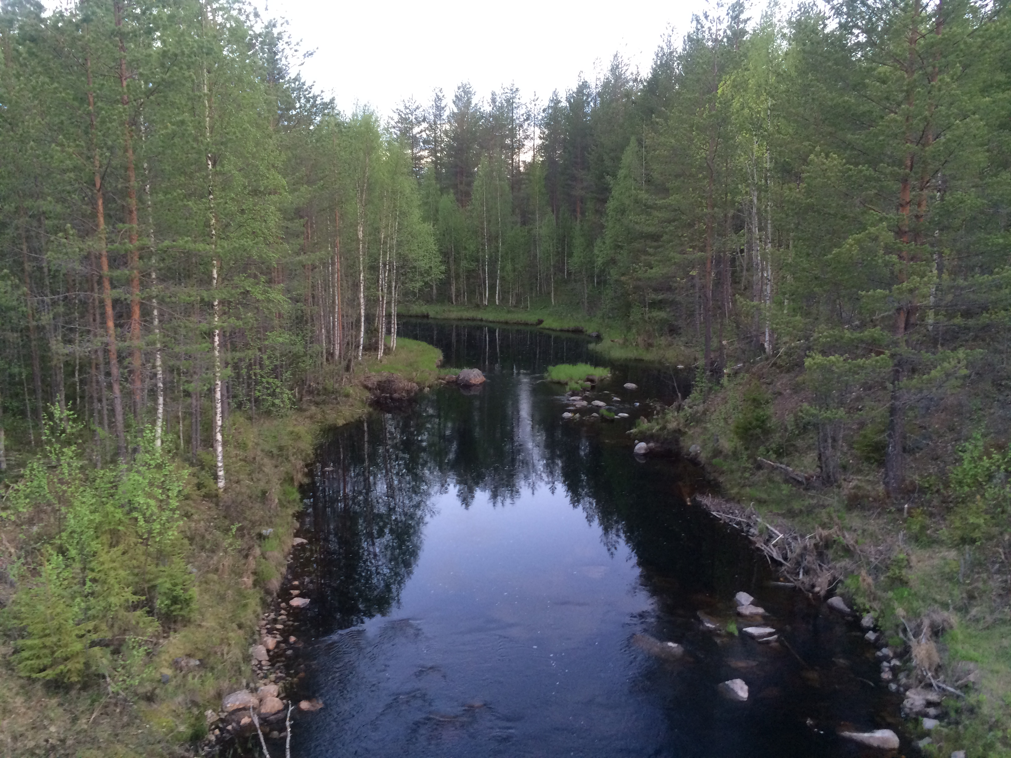 Олонга (Карелия)